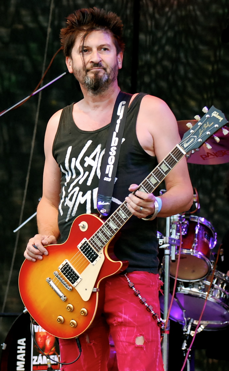 Michal Pixa v Jaroměři 2011